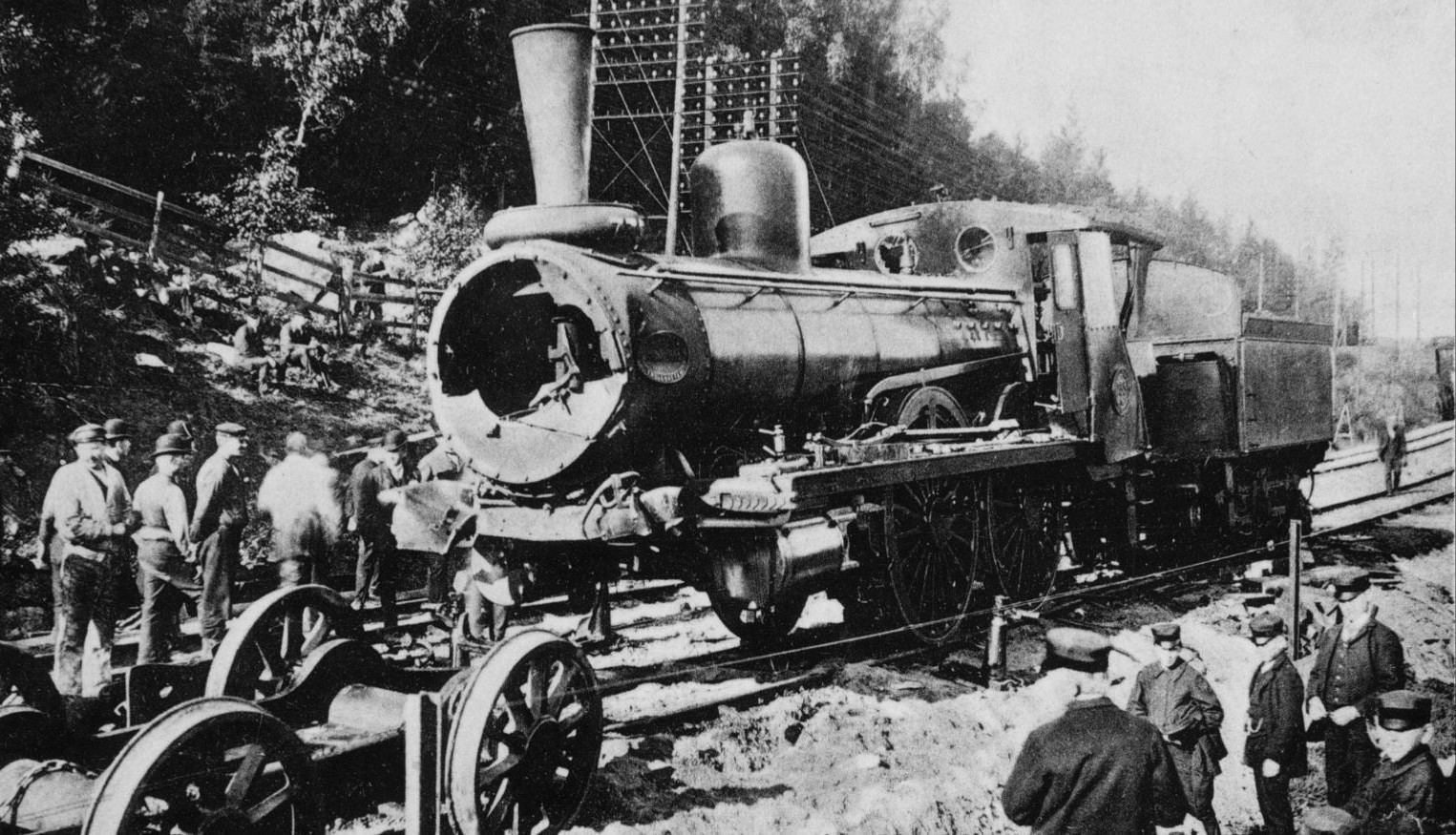 Tågolycka i september 1908 strax norr om Huddinge station med "Döda bron" i bakgrunden. Huddinge hembygdsförening: Den 19 september 1908 inträffade en olycka i kurvan norr om bangården, där dubbelspåret inte var färdigt. Ett godståg till Stockholm skulle stanna på stationen och där möta ett snälltåg till Malmö. Föraren av godståget uppmärksammade inte stoppsignalen utan passerade stationen varefter tågen kolliderade. Tre passagerare och en konduktör skadades och de materiella skadorna uppgick till 210 000 kronor. Resenärerna togs om hand på stationen.